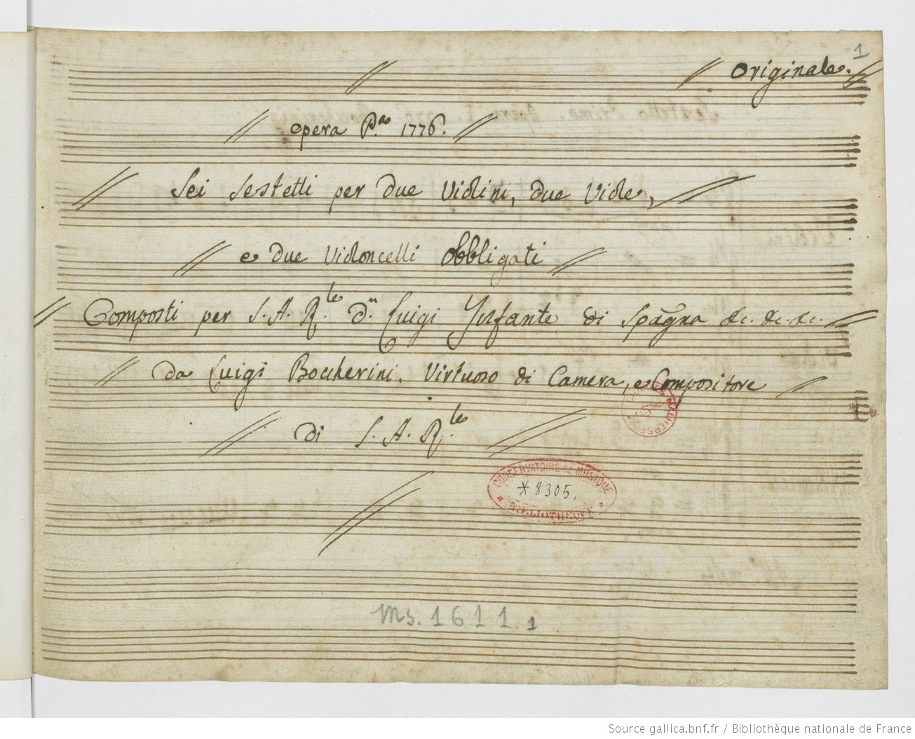 Page manuscrite des sextuors à cordes de Luigi Boccherini (1776) [G.454-459].